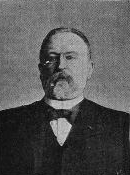 Photo Louis Prosper Guénin. Photo dans le domaine public vu l'âge de Louis.